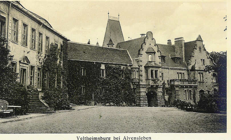 Veltheimsburg Postkarte